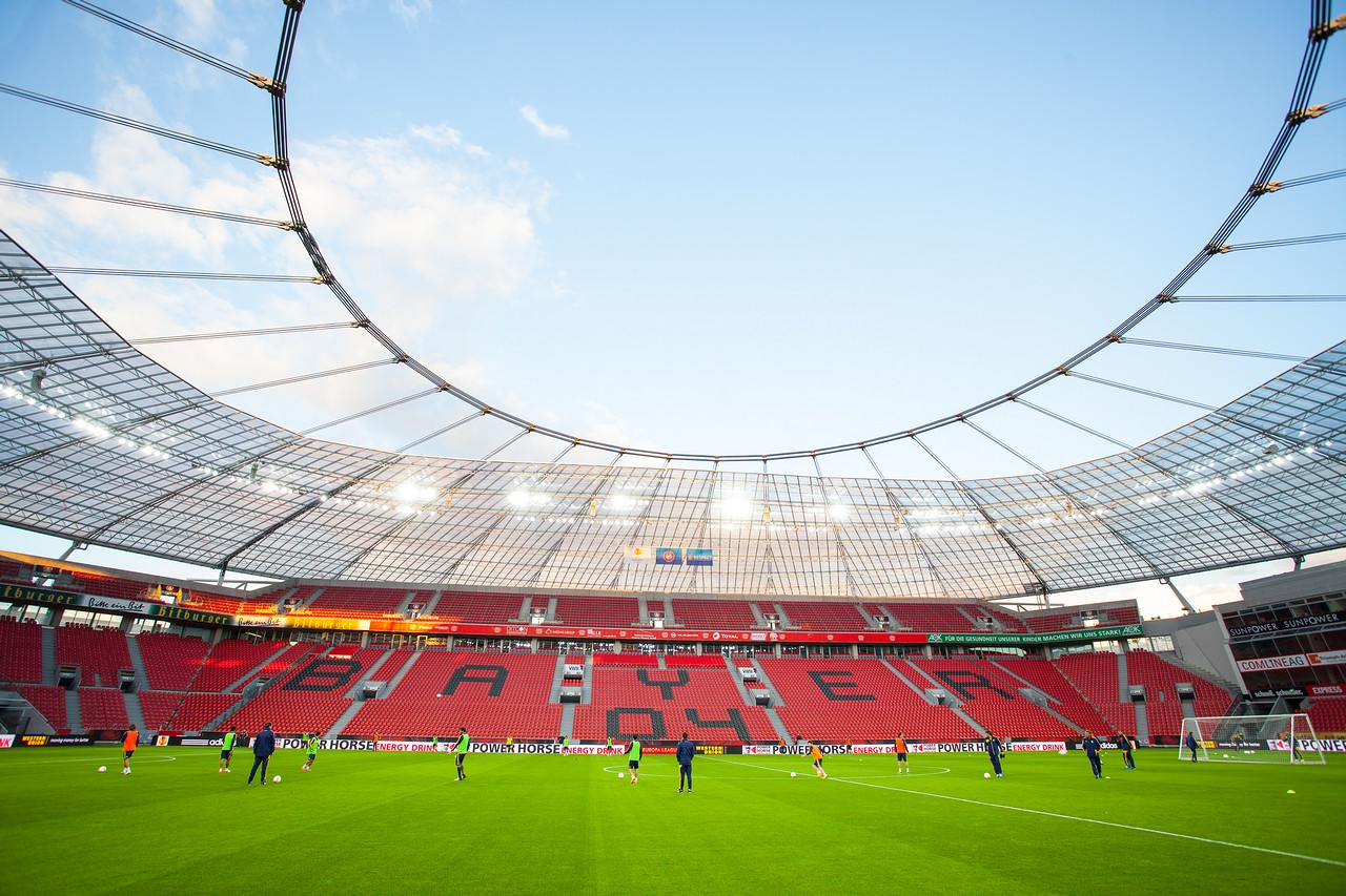 Bayarena Leverkusen